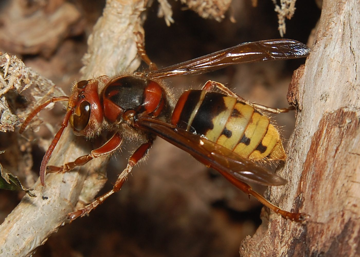 Vespa crabro, Arbeiterin, vor Nesteingang in einer Baumhöhle. Berlin, Grunewald